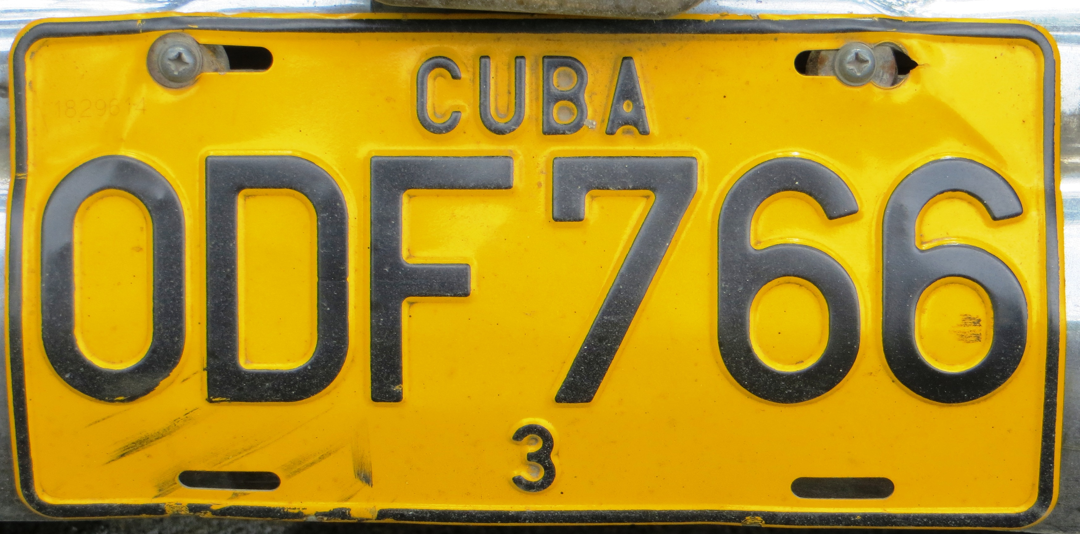 Kentekenplaat uit Cuba